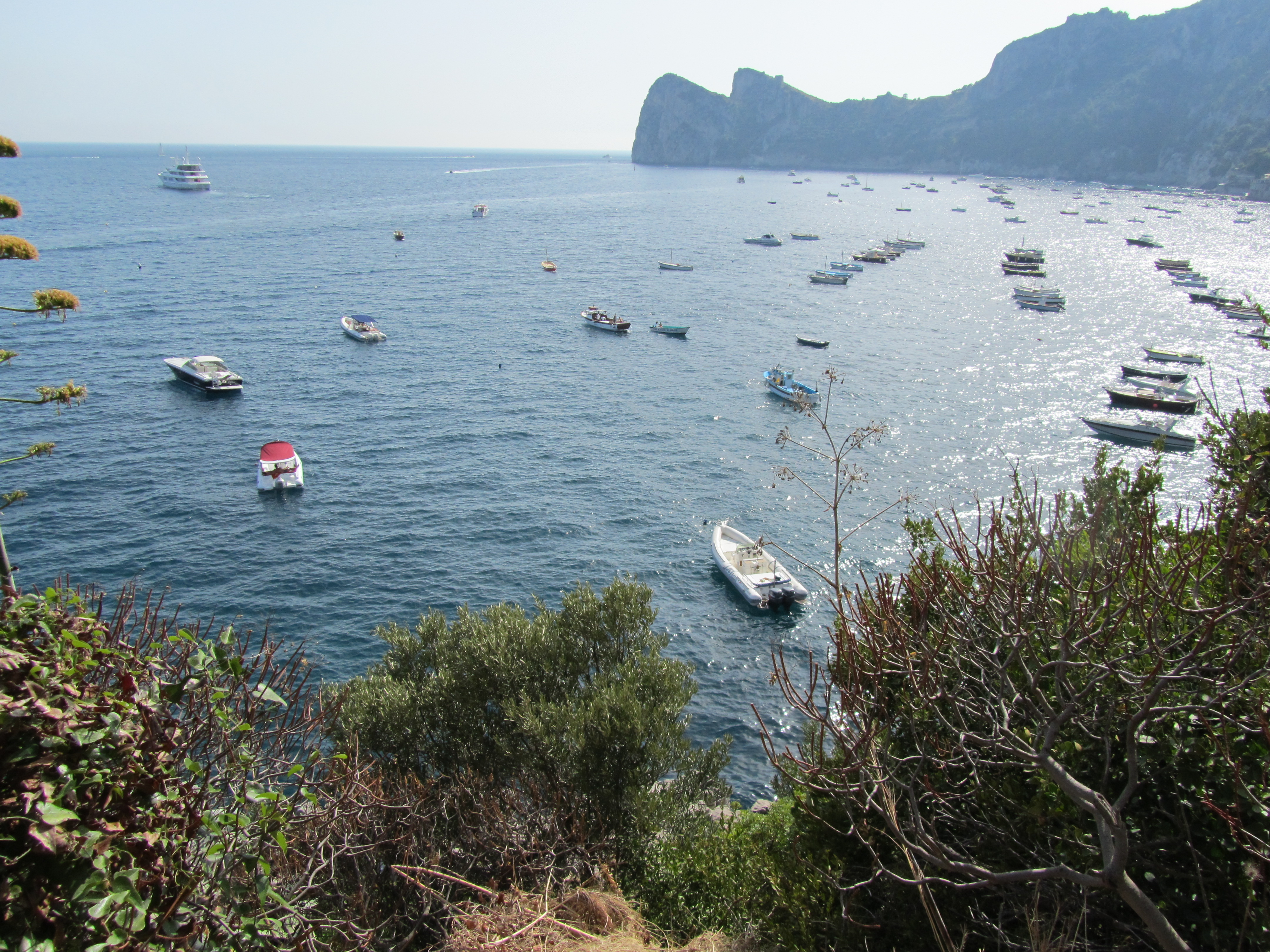 Costiera Sorrentina (da Massa Lubrense)